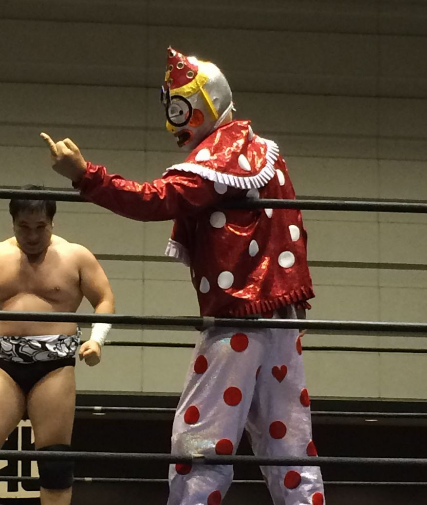 2014年DDTにて